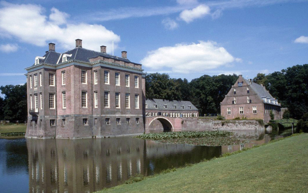 KASTEEL MIDDACHTEN: Exterieur OVERZICHT LINKER ZIJGEVEL, ACHTERGEVEL